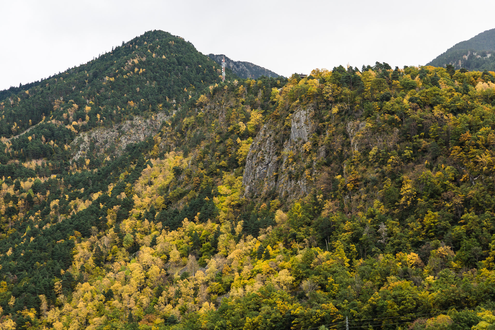 Andorra